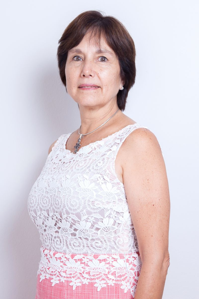 Ministra de Salud de Chile, Carmen Castillo